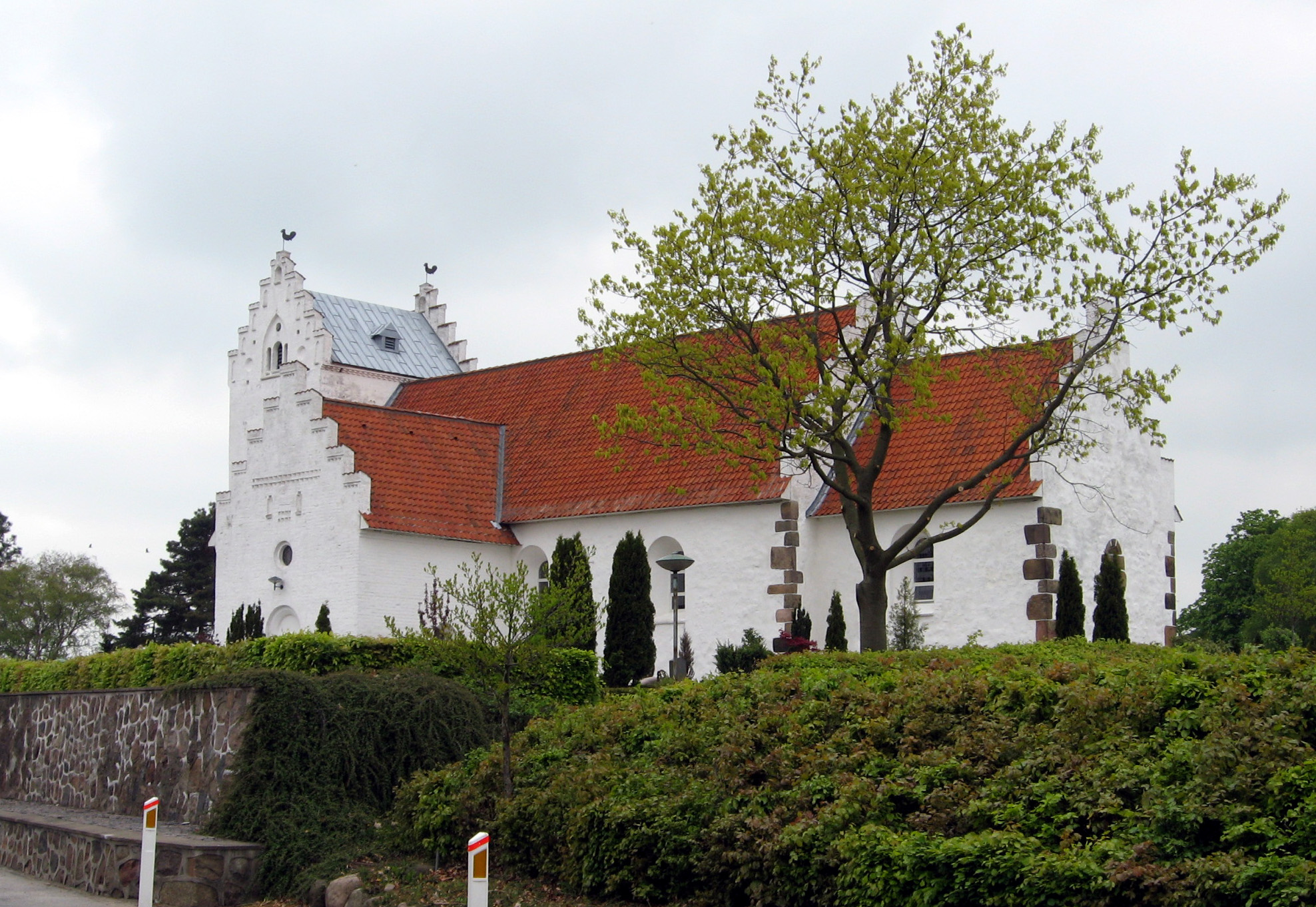 Tilst Kirke in Tilst Sogn, Århus Kommune, Denmark.